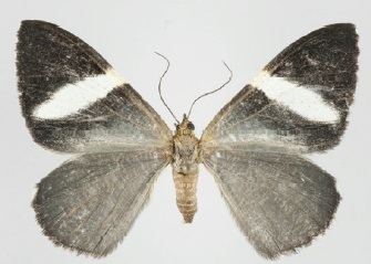 Hagnagora hedwigae